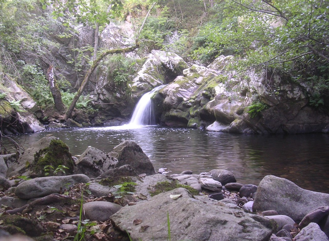 Gorges de l'Arcueil (15) France